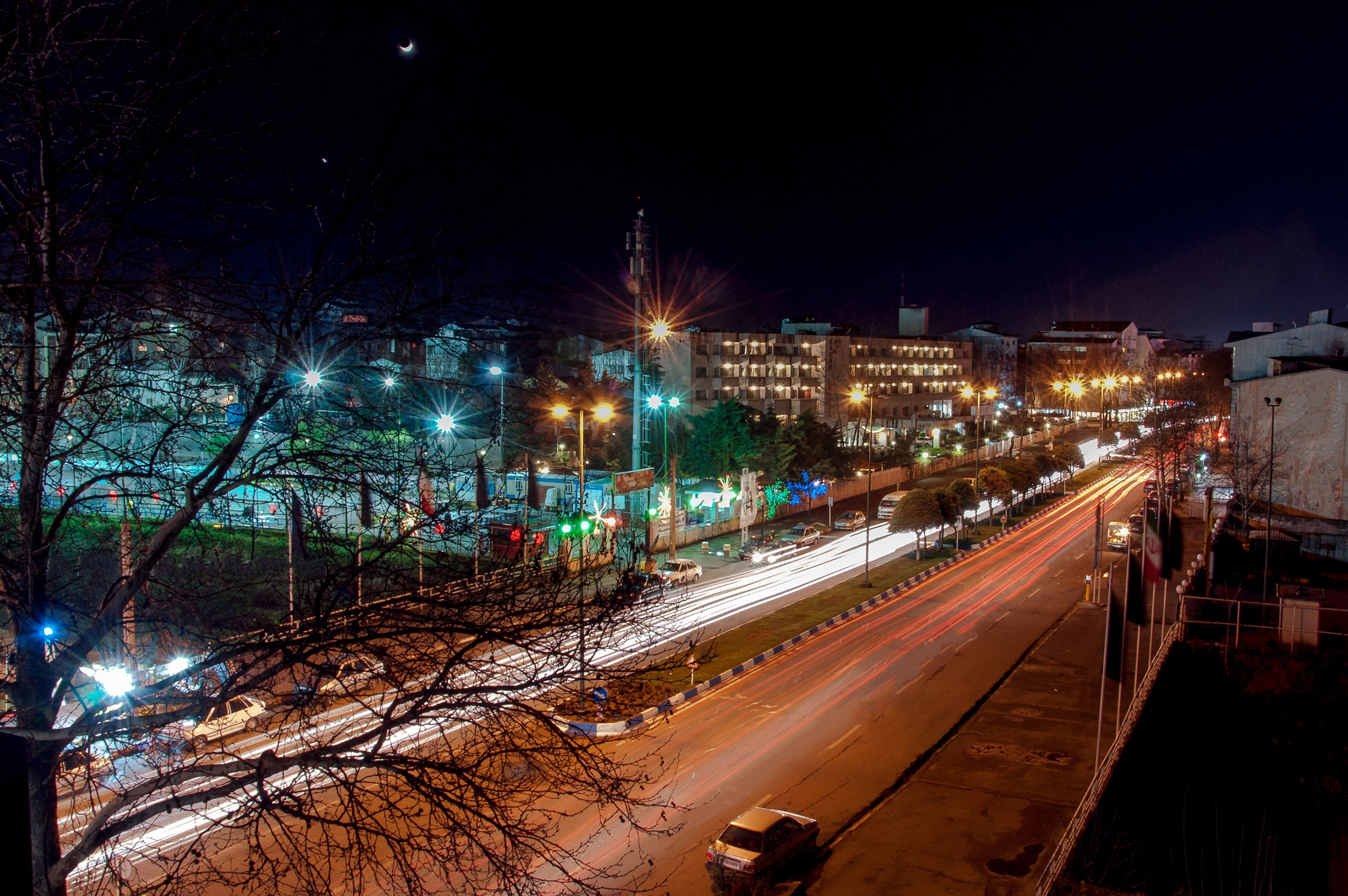 نمایی از هتل کادوس رشت قبل از باز معماری